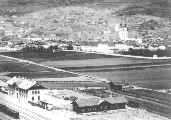 Bressanone nel 1870